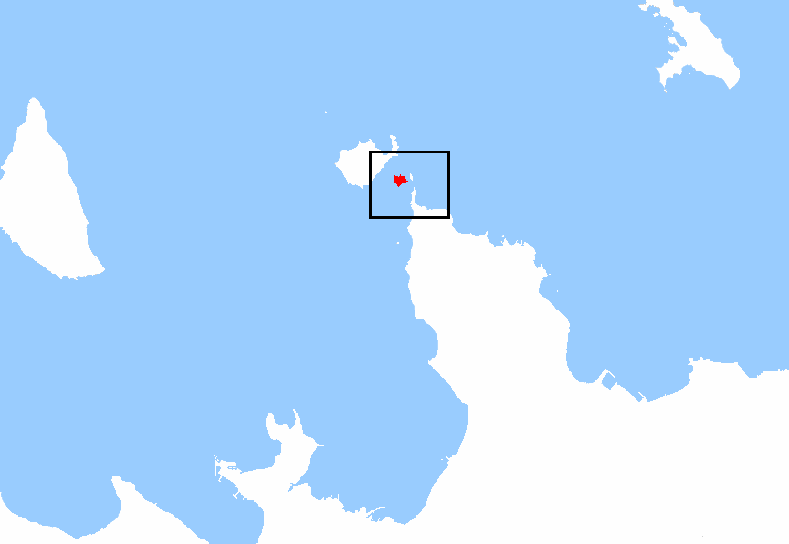 Kräsuli is a little island in Estonia.